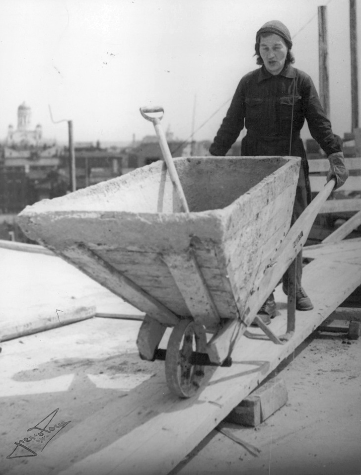 Fröken Katima Prokoff, finsk byggnadsarbeterska